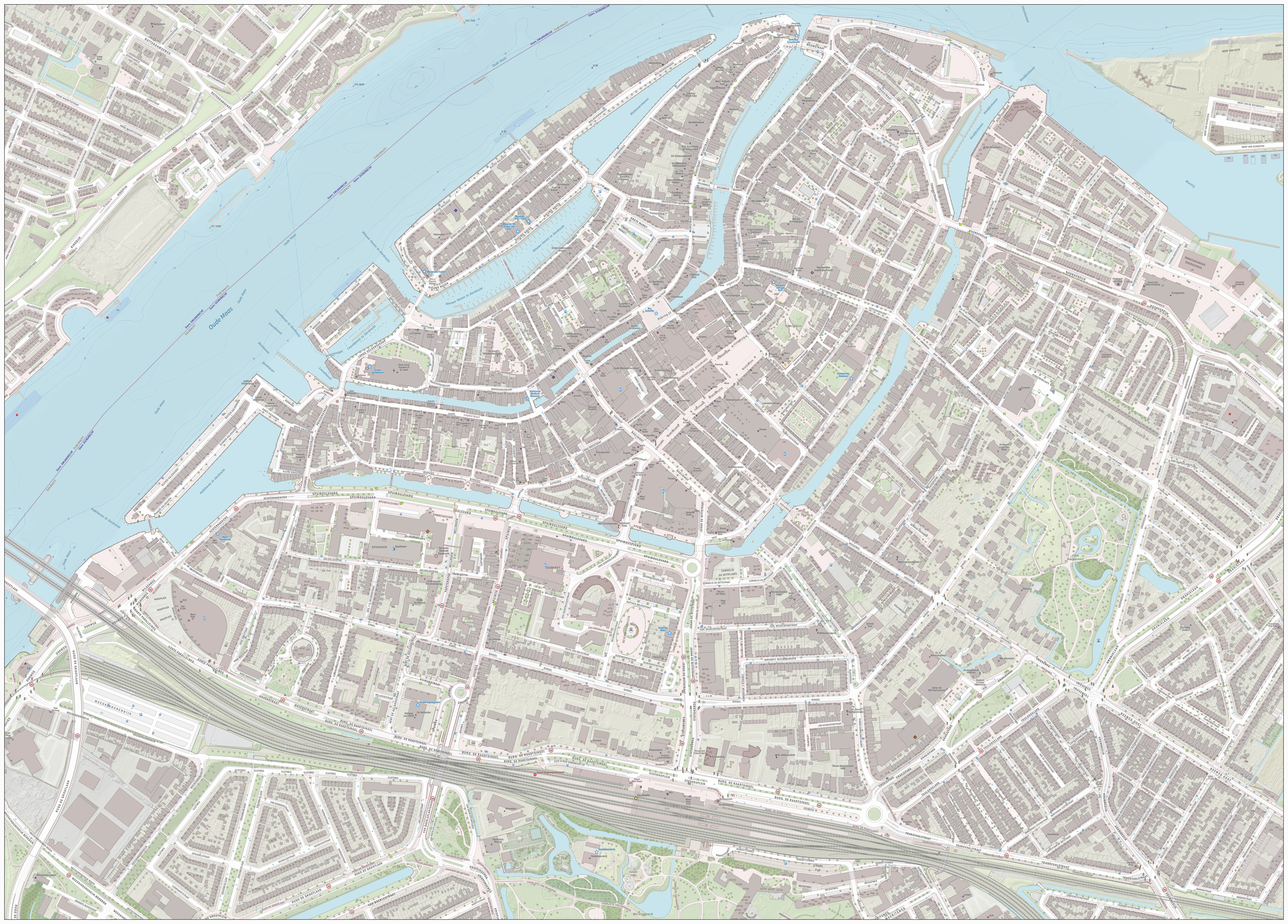 Topografische kaart van Dordrecht (centrum van woonplaats). Resolutie: 2688 pixels/km. Kaartbeeld samengesteld uit de open geodata van de Basisregistratie Grootschalige Topografie (BGT), Creative Commons-BY Kadaster, en Top10NL en Top25namen (Basisregistratie Topografie, Kadaster), Creative Commons-BY Kadaster. Gebouwvlakken uit open geodata BAG extract, Creative Commons-BY Kadaster. Wegen uit de OpenStreetMap, CC-BY OpenStreetMap bijdragers. Reliëfschaduw uit de Actuele Hoogtekaart AHN2/AHN3. Samenstelling en kleurenschema: Jan-Willem van Aalst, met QGIS2. Zie ook de Legenda.